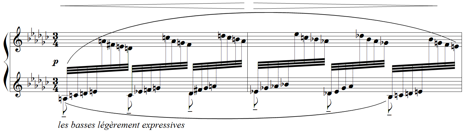 Debussy - Etude "pour les huit doigts", mes. 54-55